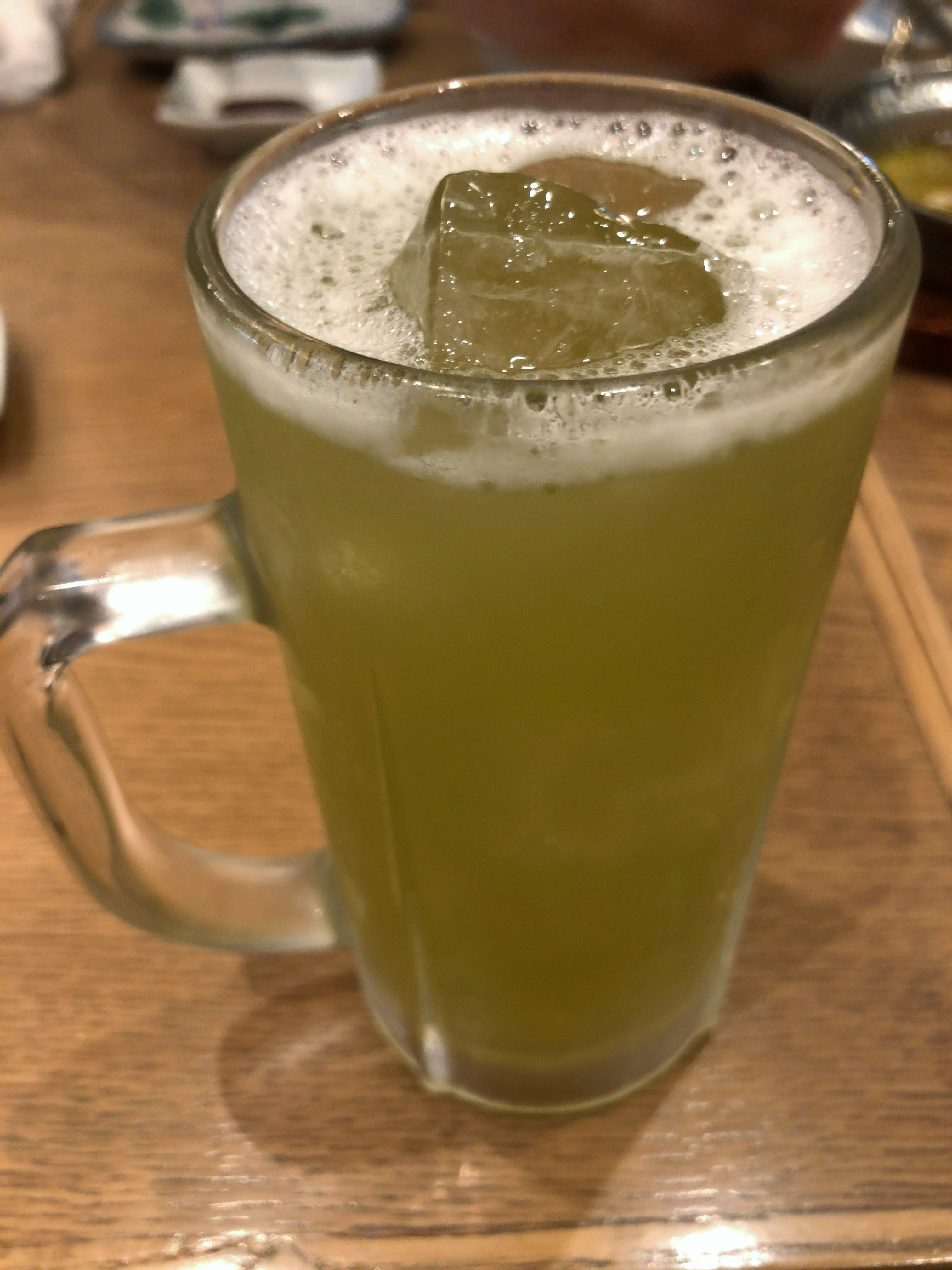 標準的な静岡割り。緑茶に焼酎を混ぜたもの。静岡の居酒屋等で標準的に提供される。